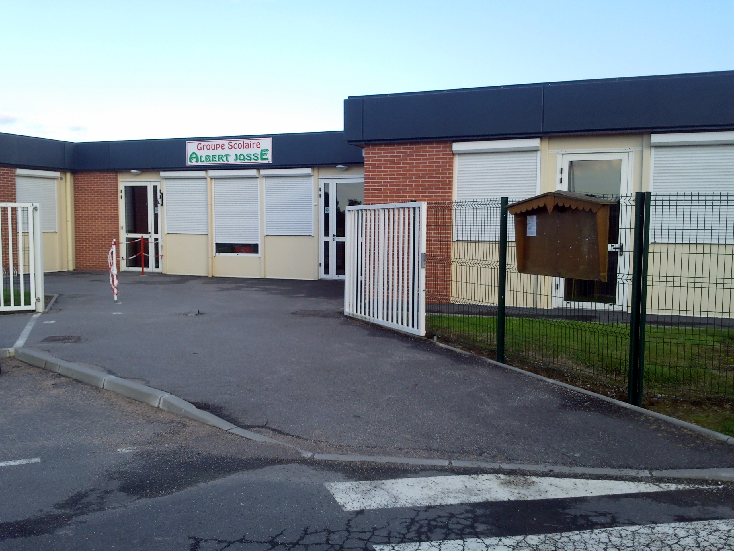 Ecole regroupant les enfants du Torpt, Fort-Moville, La Lande Saint Léger et de Martainville.